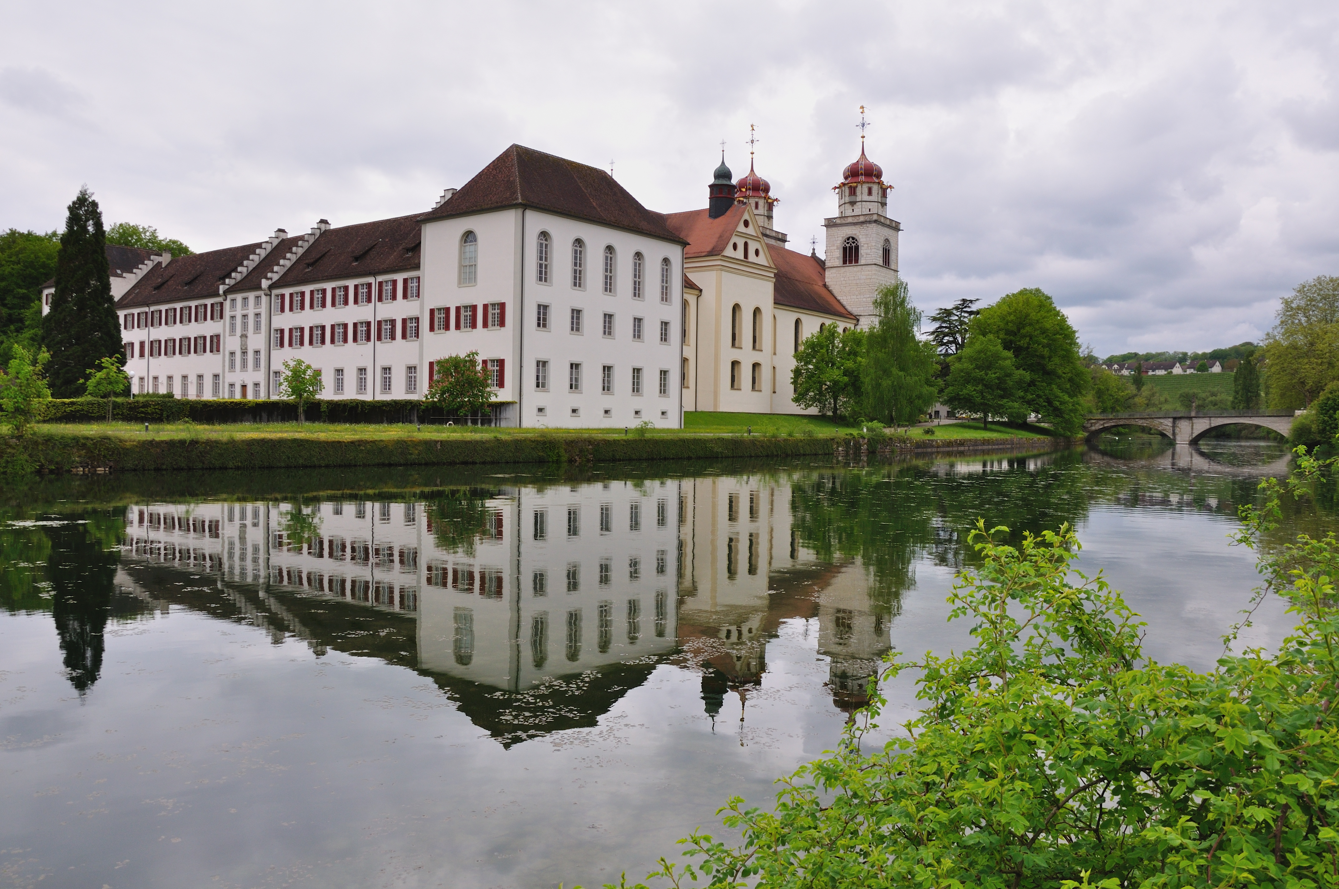 Switzerland, Canton of Zürich, Rheinau Abbey